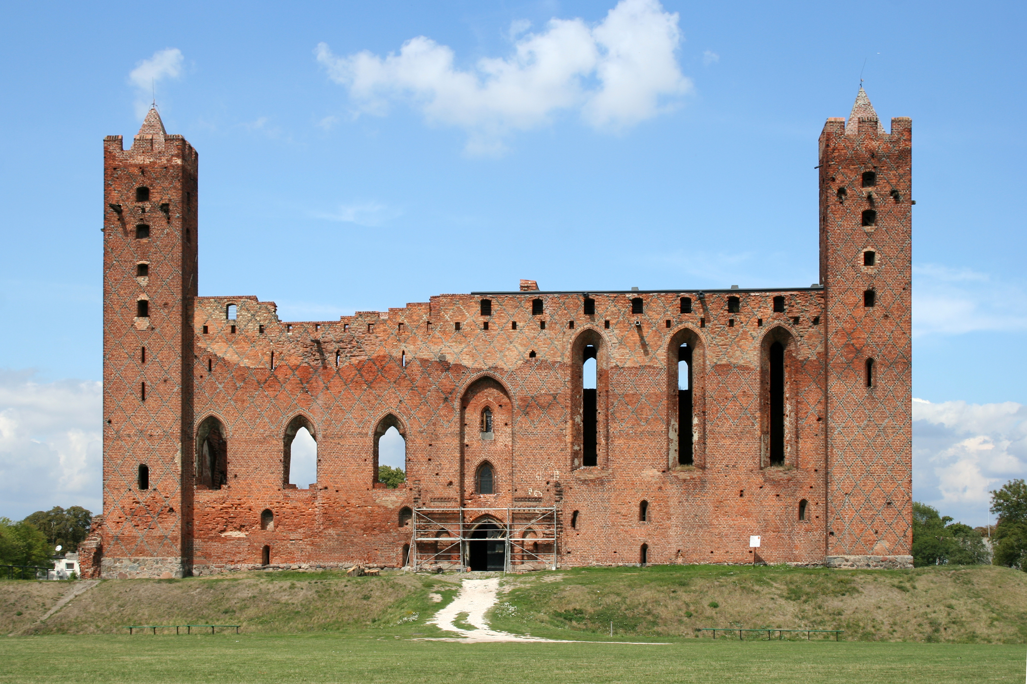 Radzyń Chełmiński, ruiny zamku, 2 poł. XIII - 1 poł. XIV